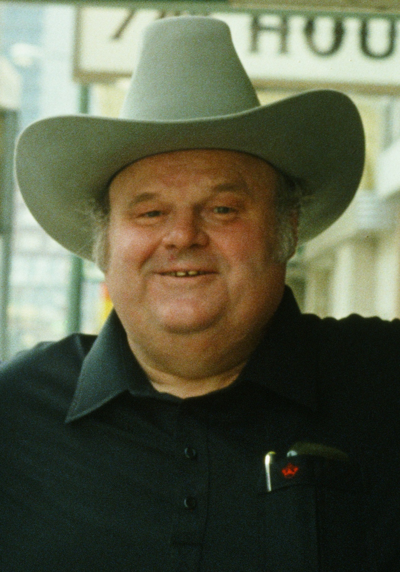 Der Tätowierer Horst Streckenbach in San Antonio 1979